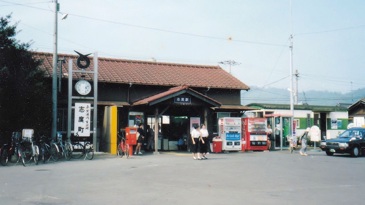 JR四国志度駅（改築前）